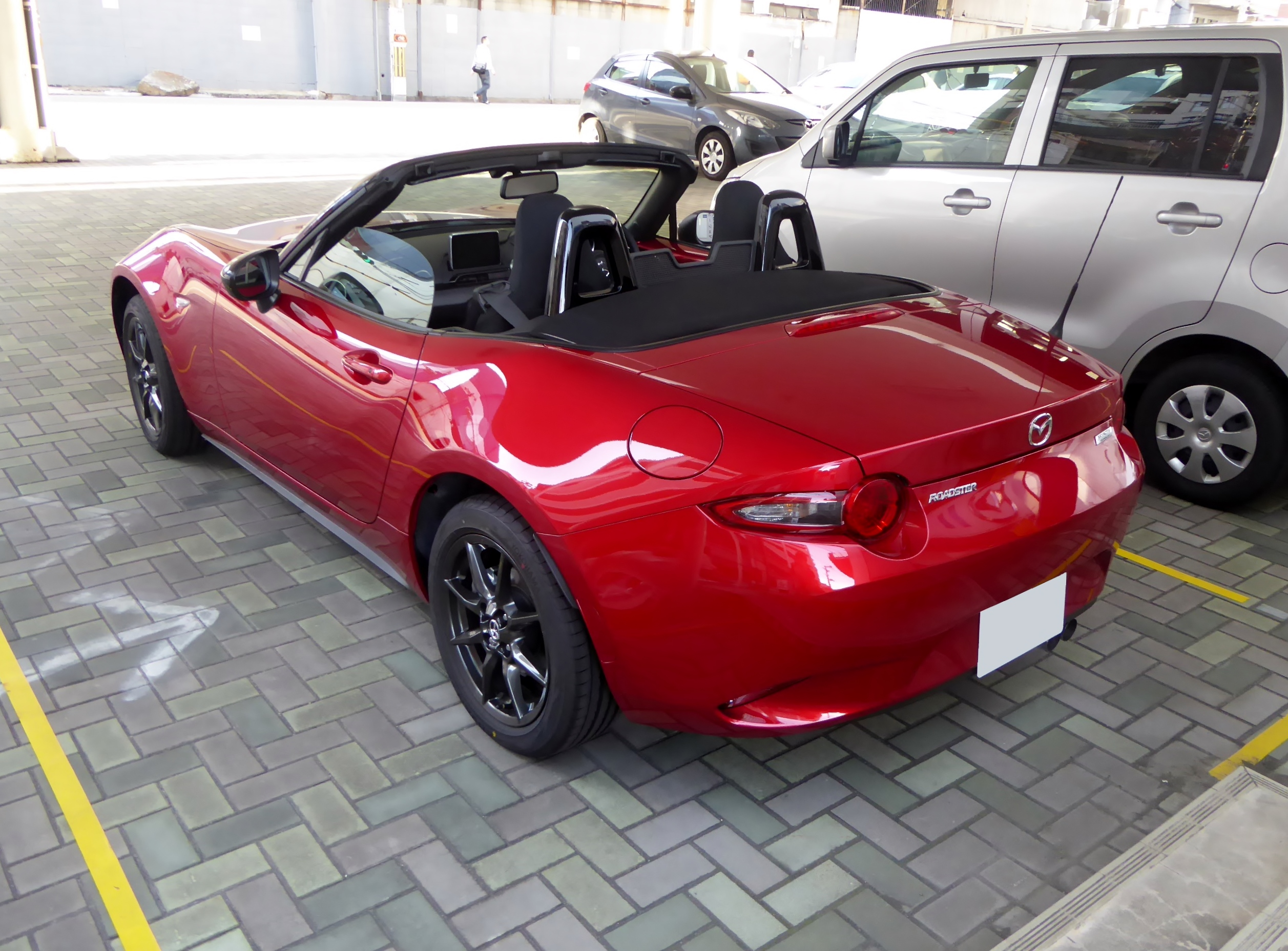 ND型マツダ・ロードスターSスペシャルパッケージをリアから撮影。